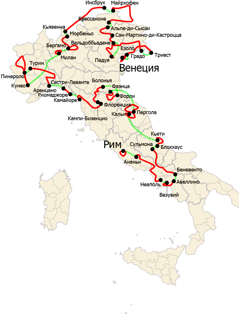 Карта маршрута многодневной гонки Джиро д’Италия 2009 на русском языке